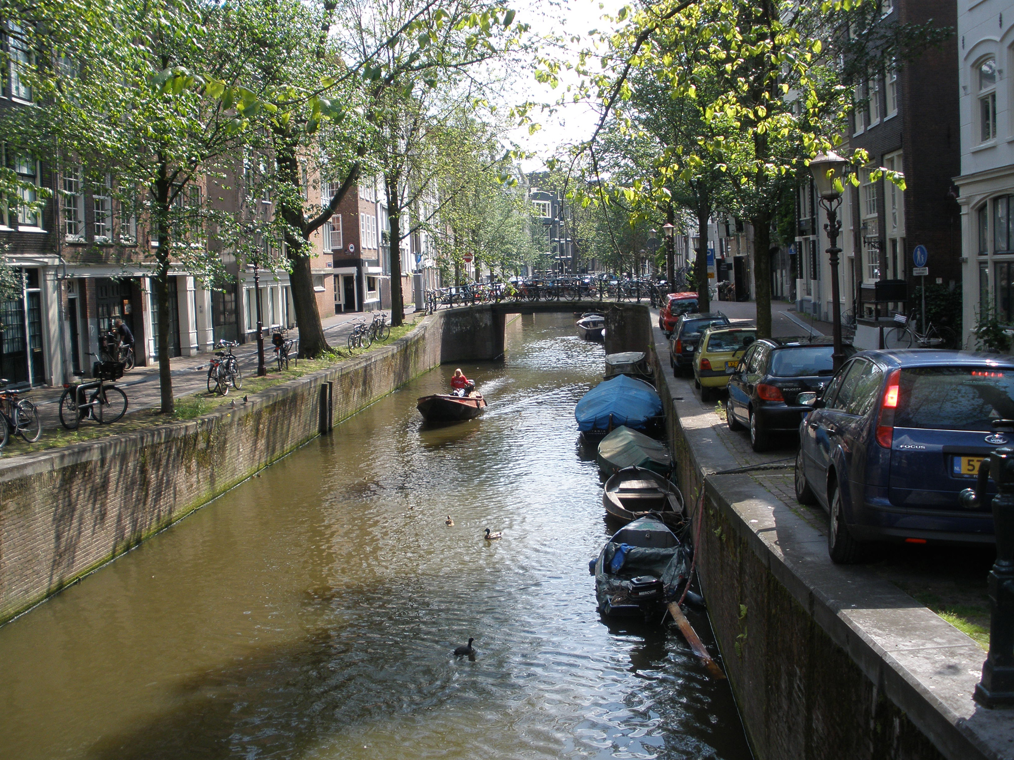 Kromboomssloot canal in Amsterdam, the Netherlands. Bridge 292 (Schottenburchsbrug).